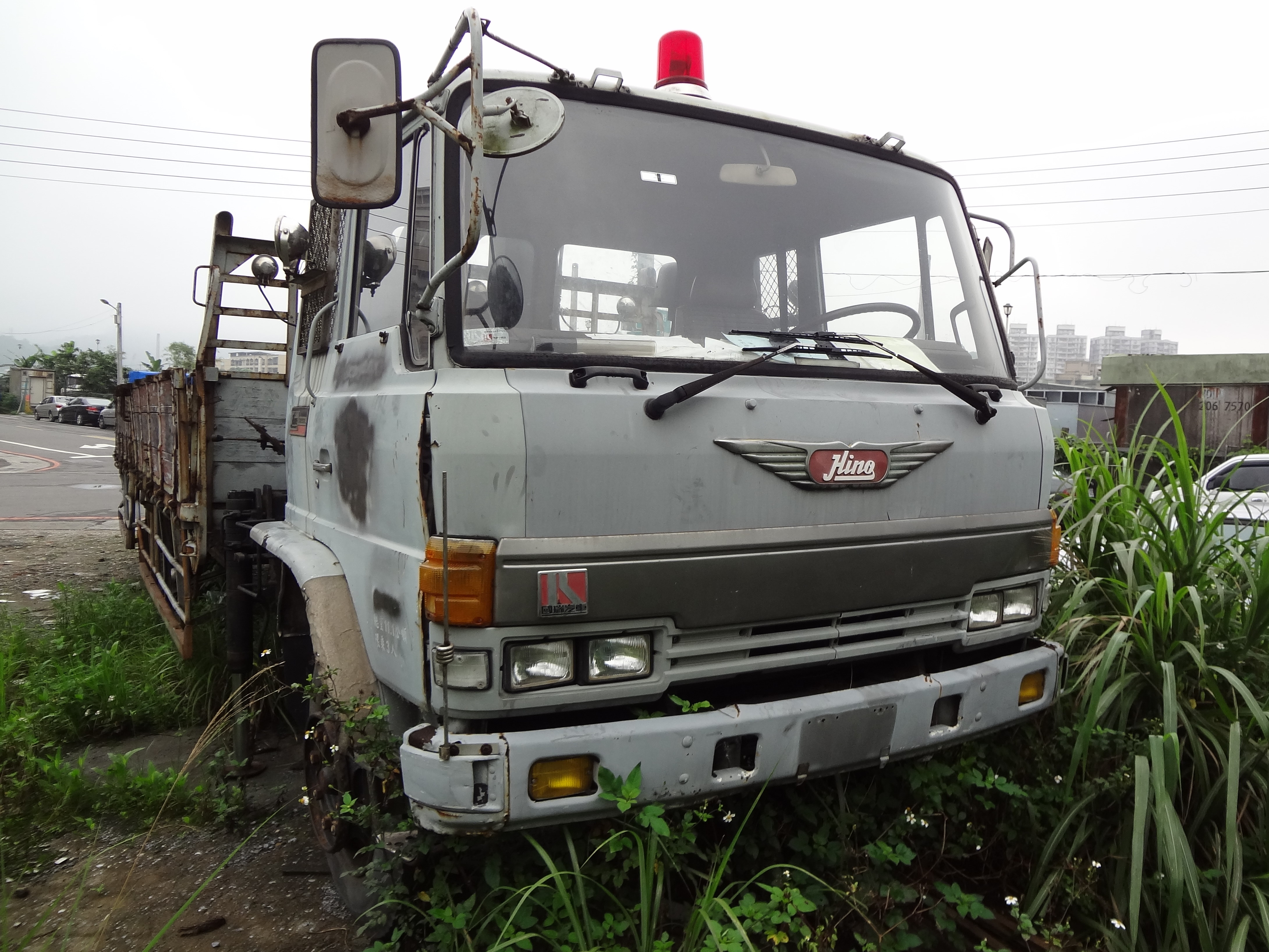 中文（台灣）: 基隆市七堵區百五街、福六街口，廢棄的原臺北市政府警察局國瑞汽車製日野大貨車車頭。